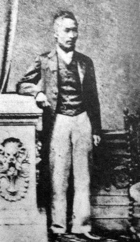 a Japanese man 寺島宗則 (Munenori Terajima)